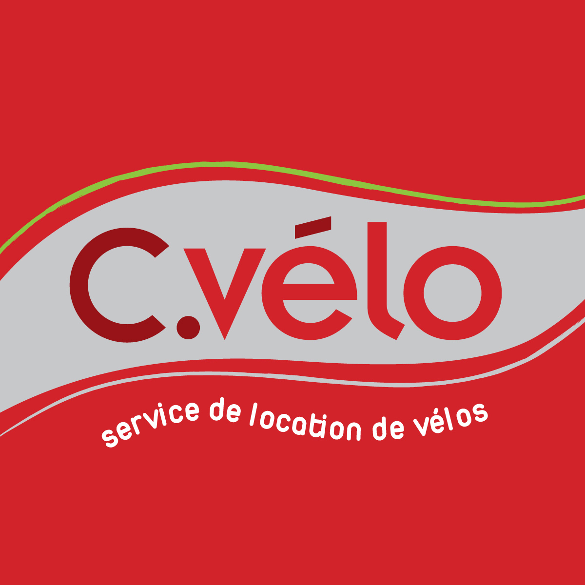 Logo du service